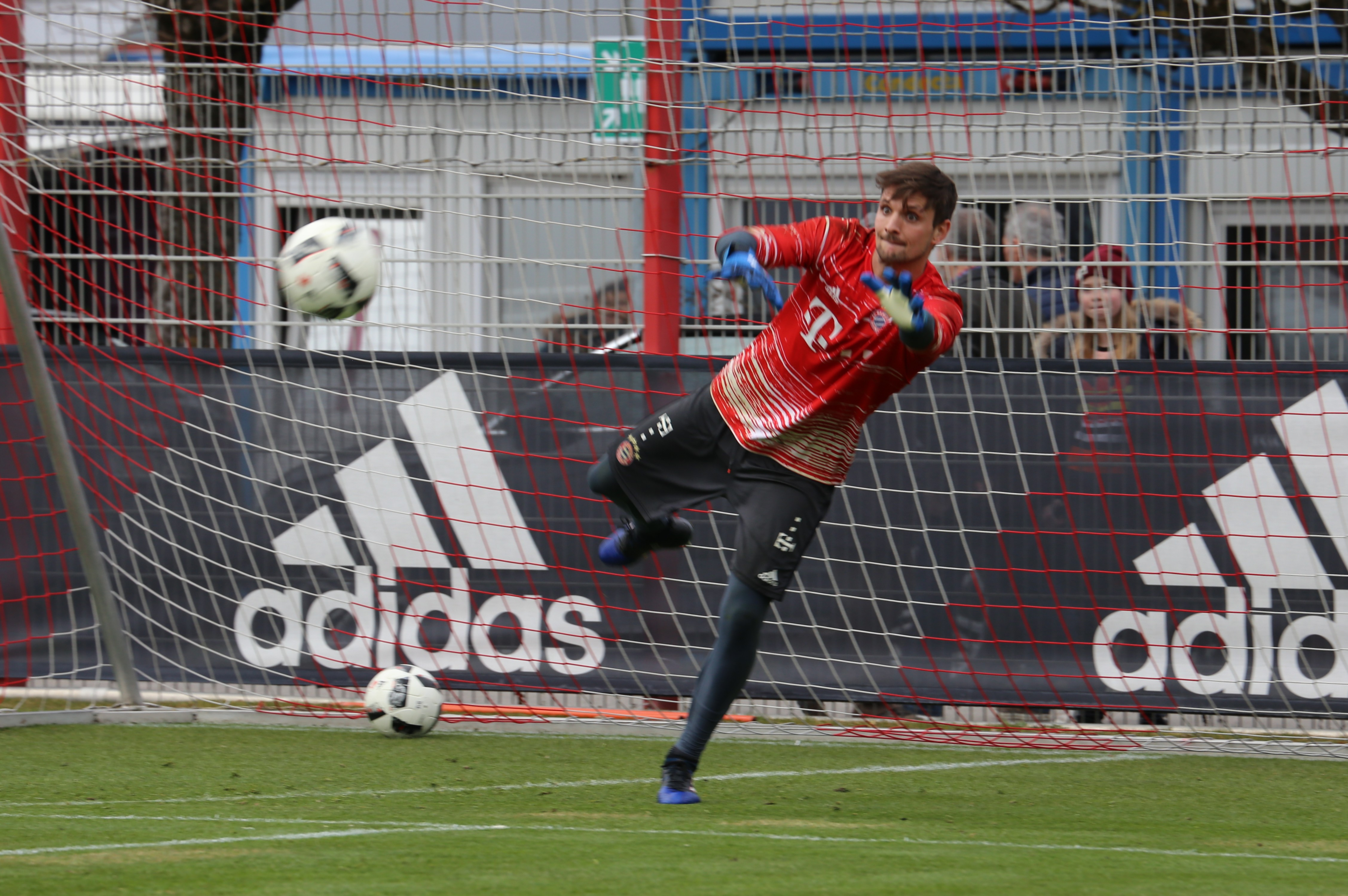 Sven Ulreich am 14. März 2017 beim Training auf dem Gelände des FC Bayern München